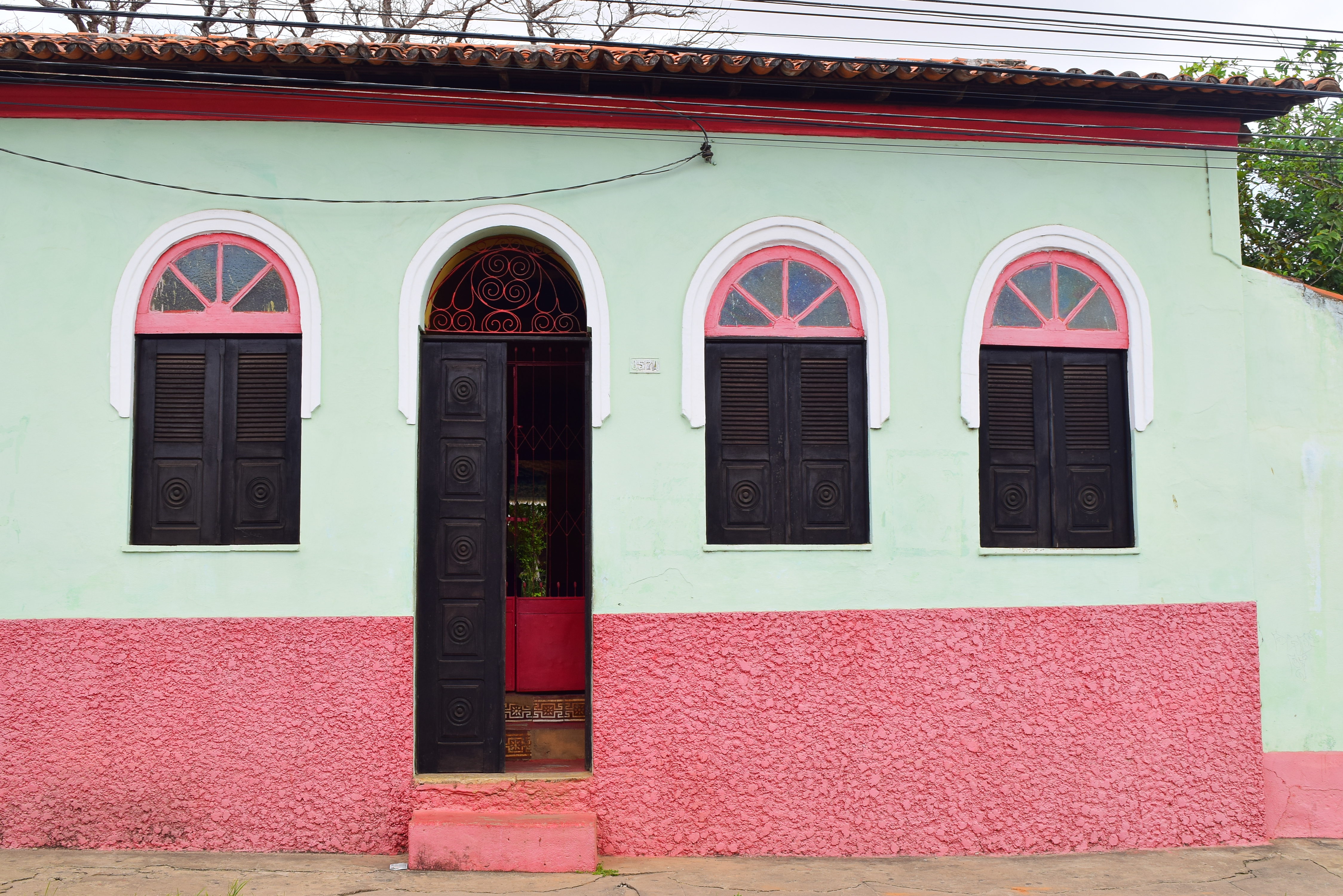 Terreiro Casa das Minas Jeje, situado na Rua de São Pantaleão nº 857 e 857A.